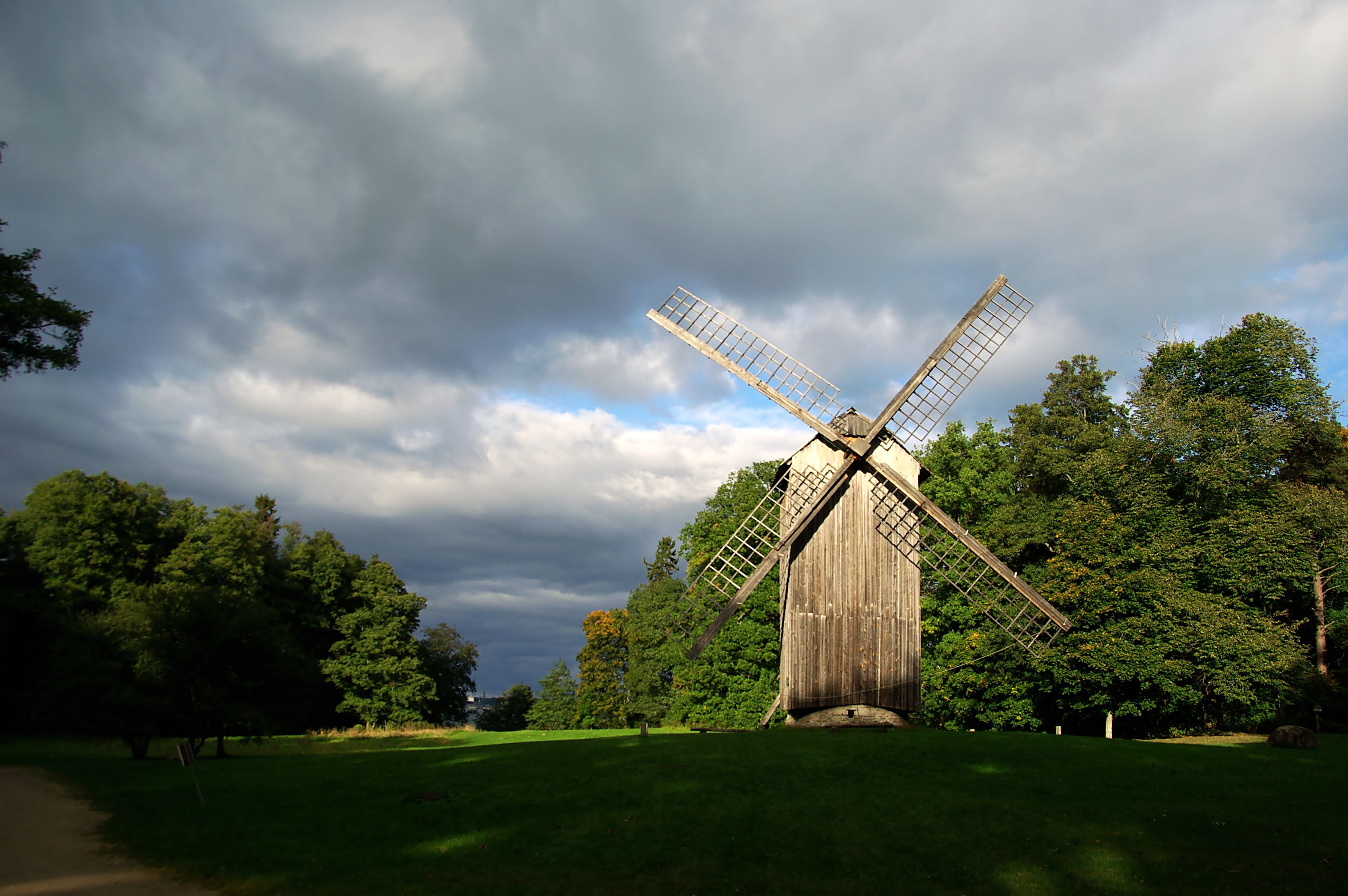 Harju maakond, Tallinna linn, Haabersti linnaosa